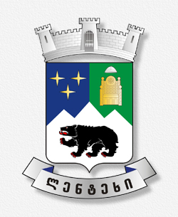 ლენტეხის მუნიციპალიტეტის გერბი